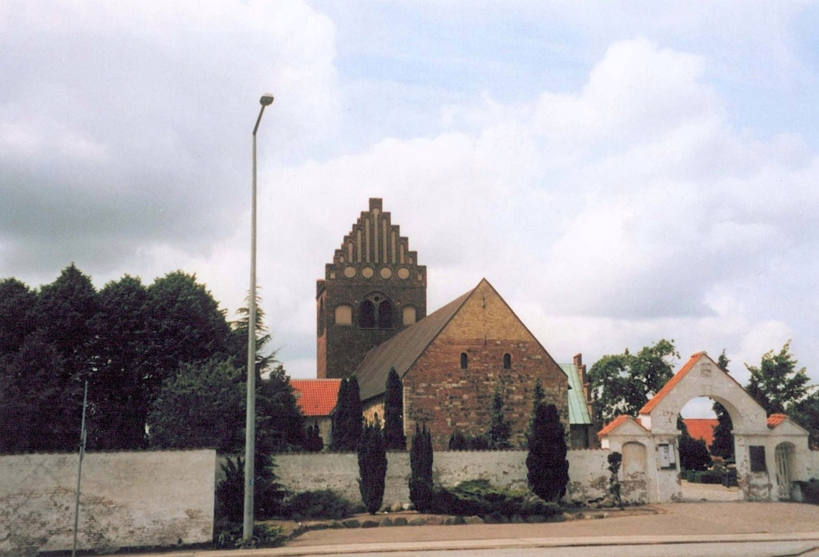 Tårnby Kirke, Tårnby Sogn, Tårnby Kommune